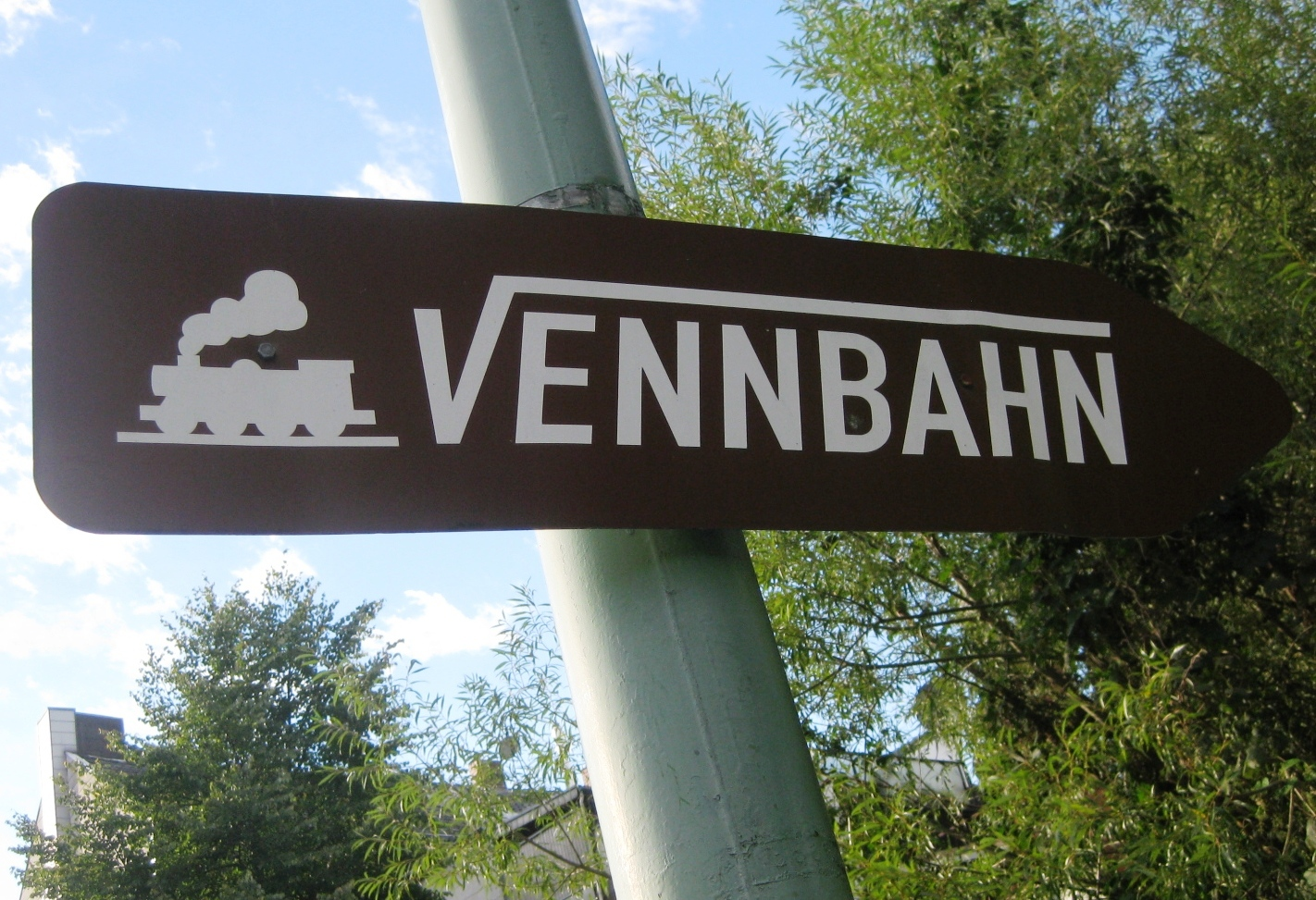 Hinweisschild der Vennbahn, aufgenommen in Stolberg (Rhld.), Städteregion Aachen, Nordrhein-Westfalen